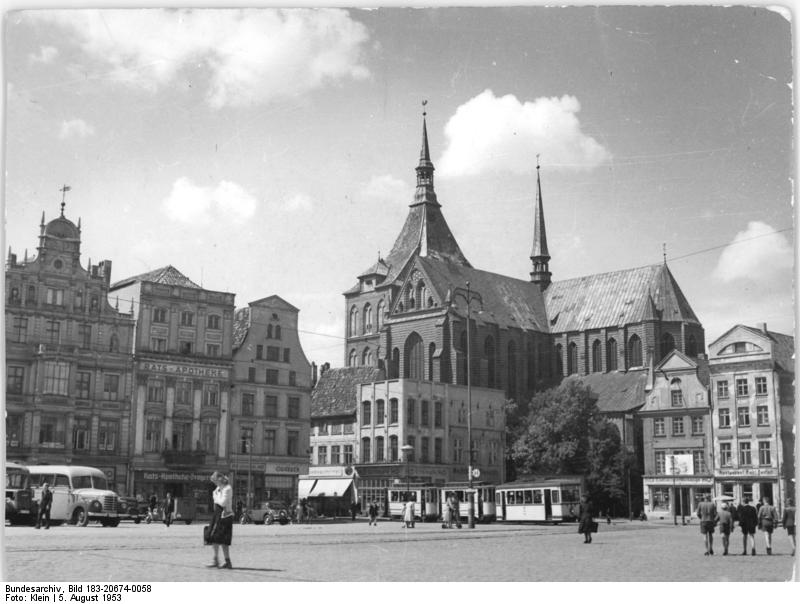 Rostock, Ernst-Thälmann-Platz (heute Neuer Markt), Marienkirche Zentralbild Klein - 5.8.1953 Rostock. UBz: Blick auf den Thälmann-Platz mit der Marienkirche.